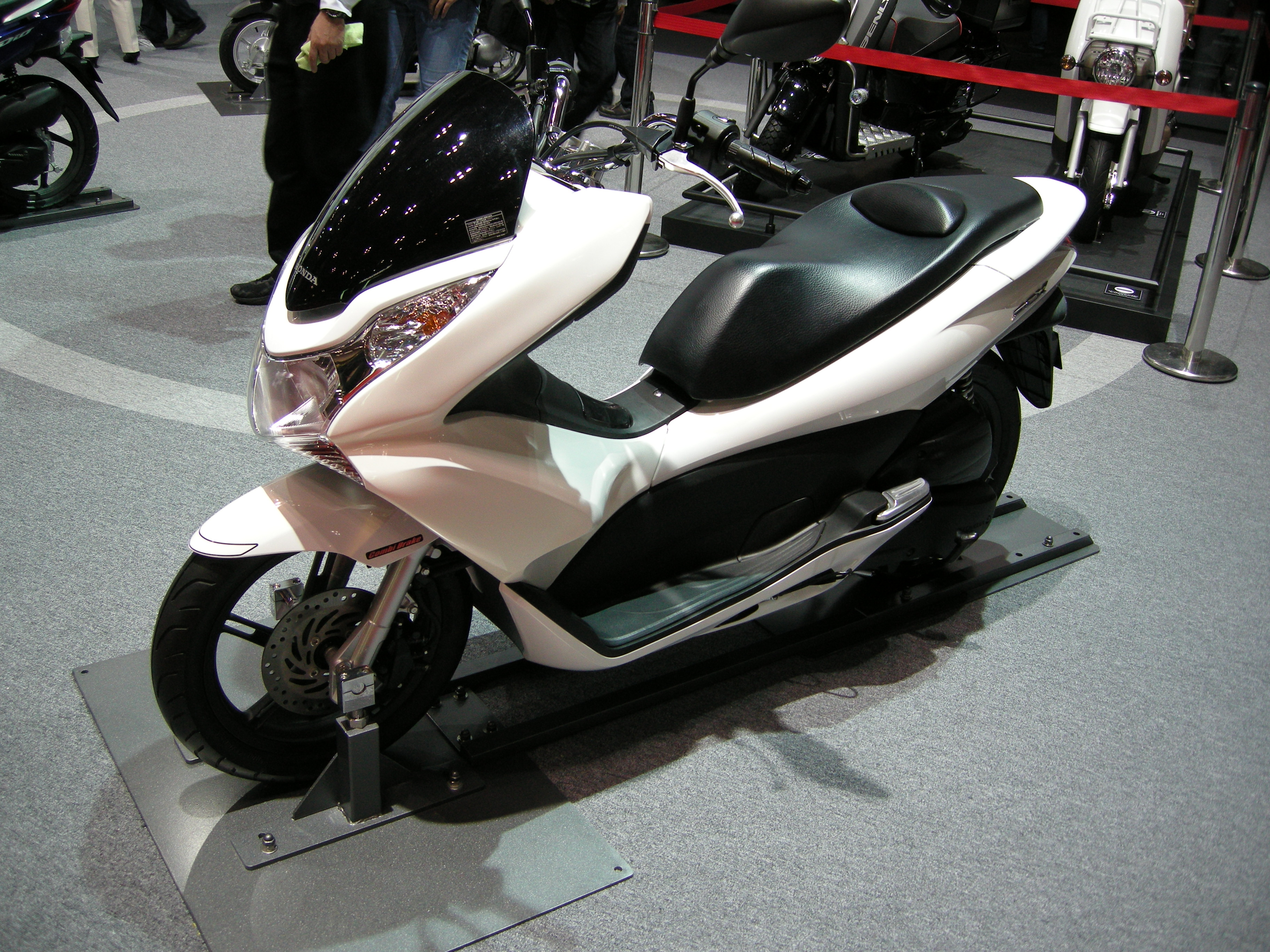 2011年東京モーターショーにて撮影